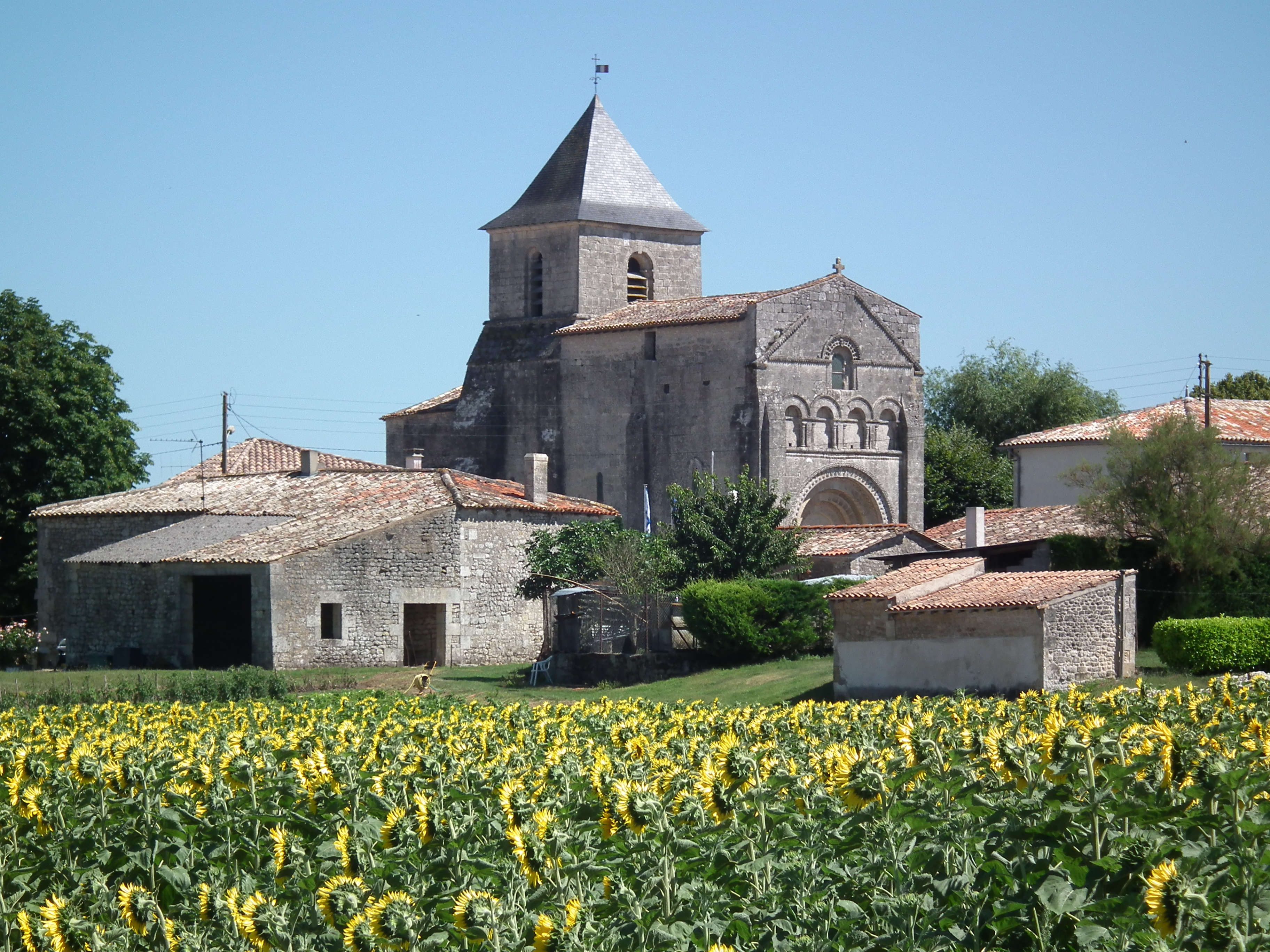 Le village de Saint-Palais-de-Phiolin